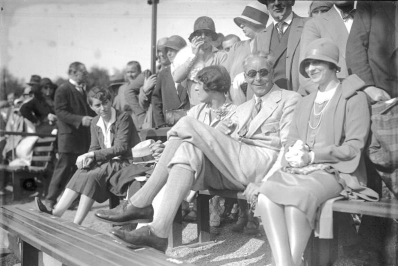 Das grosse Internationale Tennismatch Deutschland-Amerika zwischen der Tennisweltmeisterin Helen Wills und der deutschen Meisterin Frau v. Reznicek auf den Rot-Weiss-Tennisplätzen in Berlin Grunewald! Siegerin war die amerikanische Tennisweltmeisterin Helen Wills! Der deutsche Exkronprinz als Zuschauer bei dem grossen Tenniskampf Deutschland-Amerika in Berlin-Grunewald. Der Exkronprinz trägt eine Sonnenbrille als Schutz.